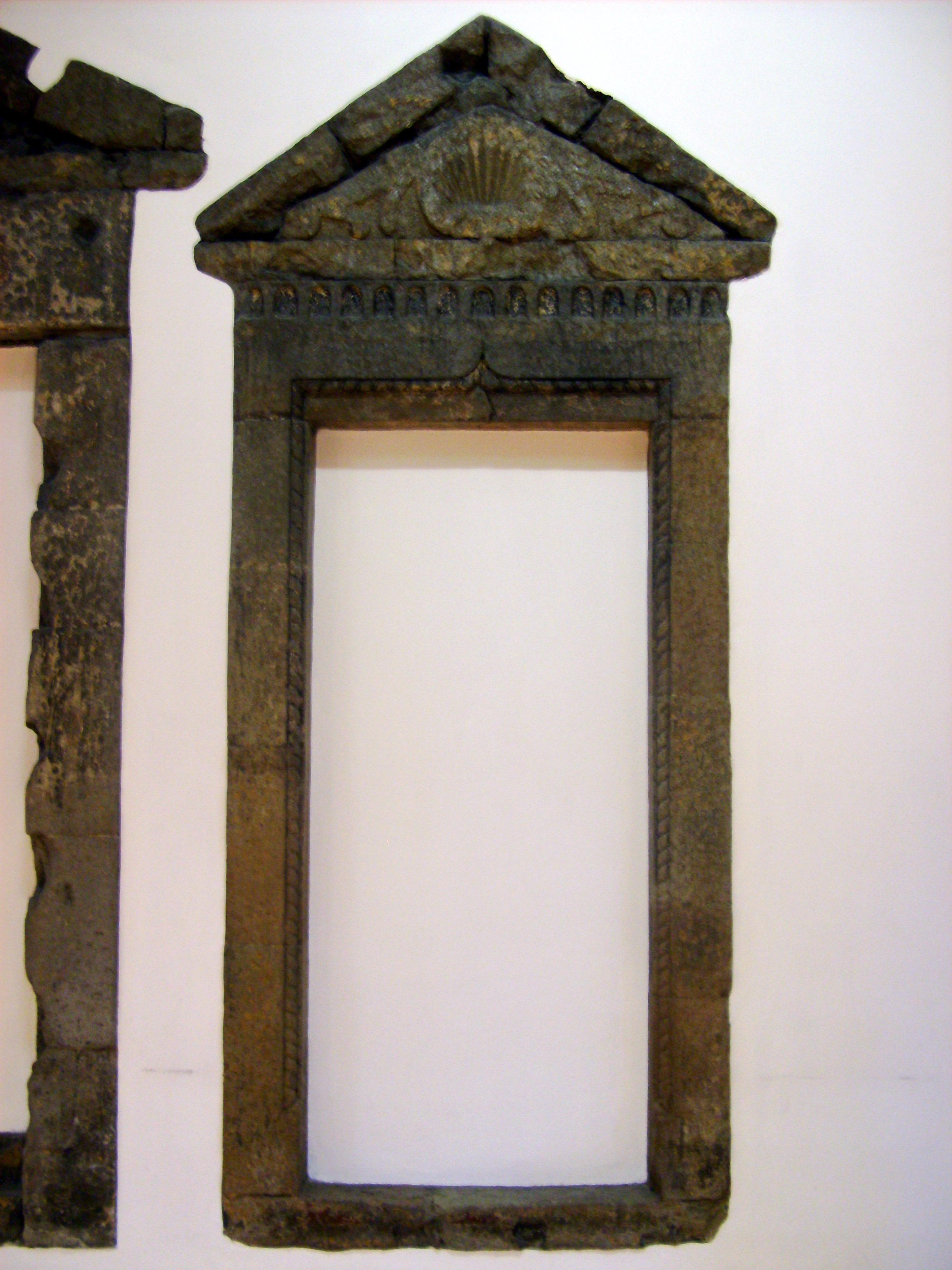 Antigo Convento da Esperança, Angra do Heroísmo, Ilha Terceira, Açores: detalhe.